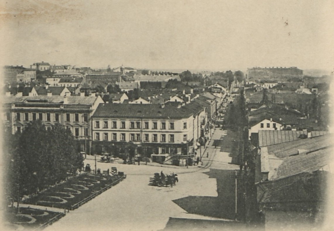 Соборная площадь